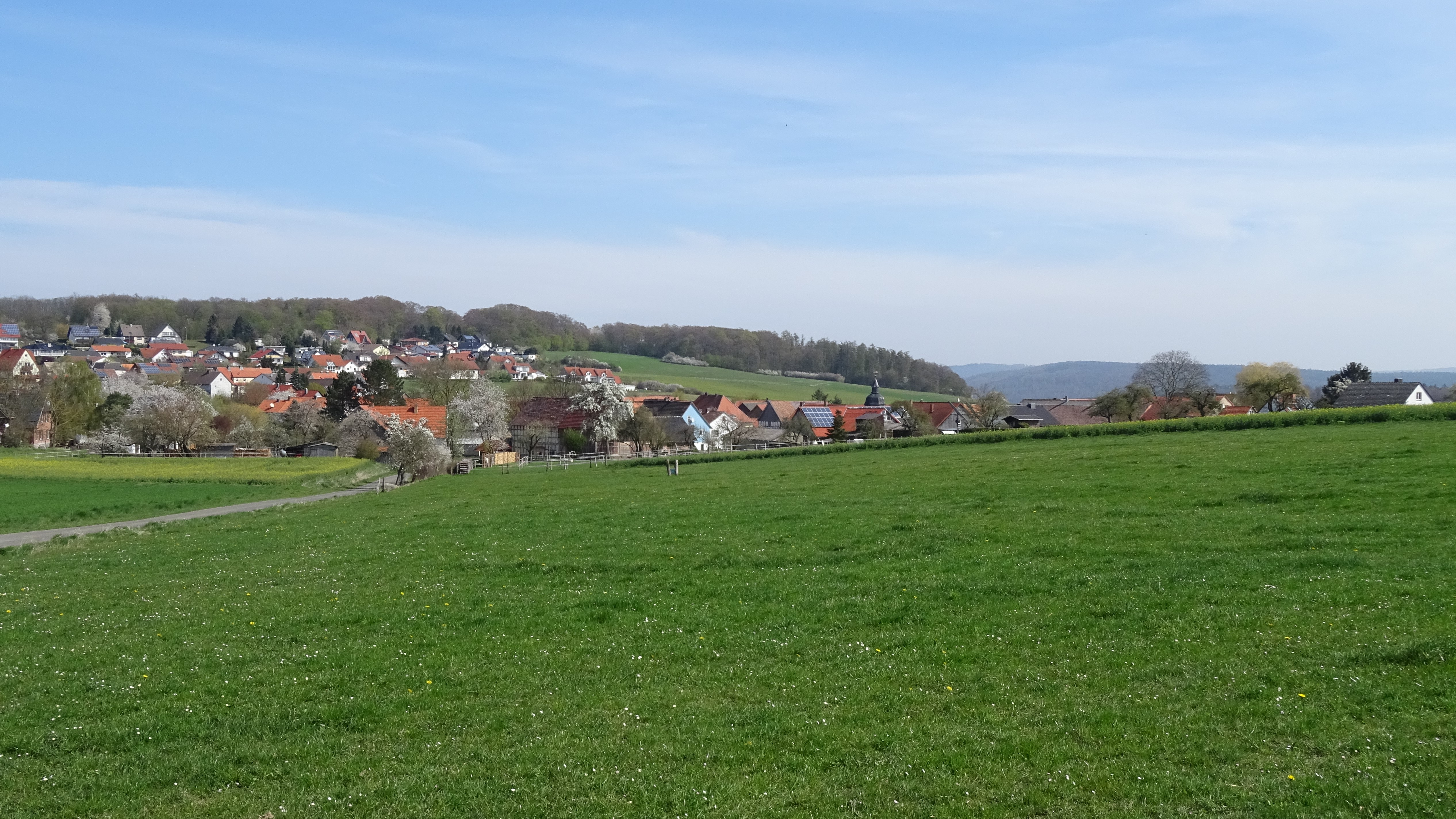 Ansicht von Südwest